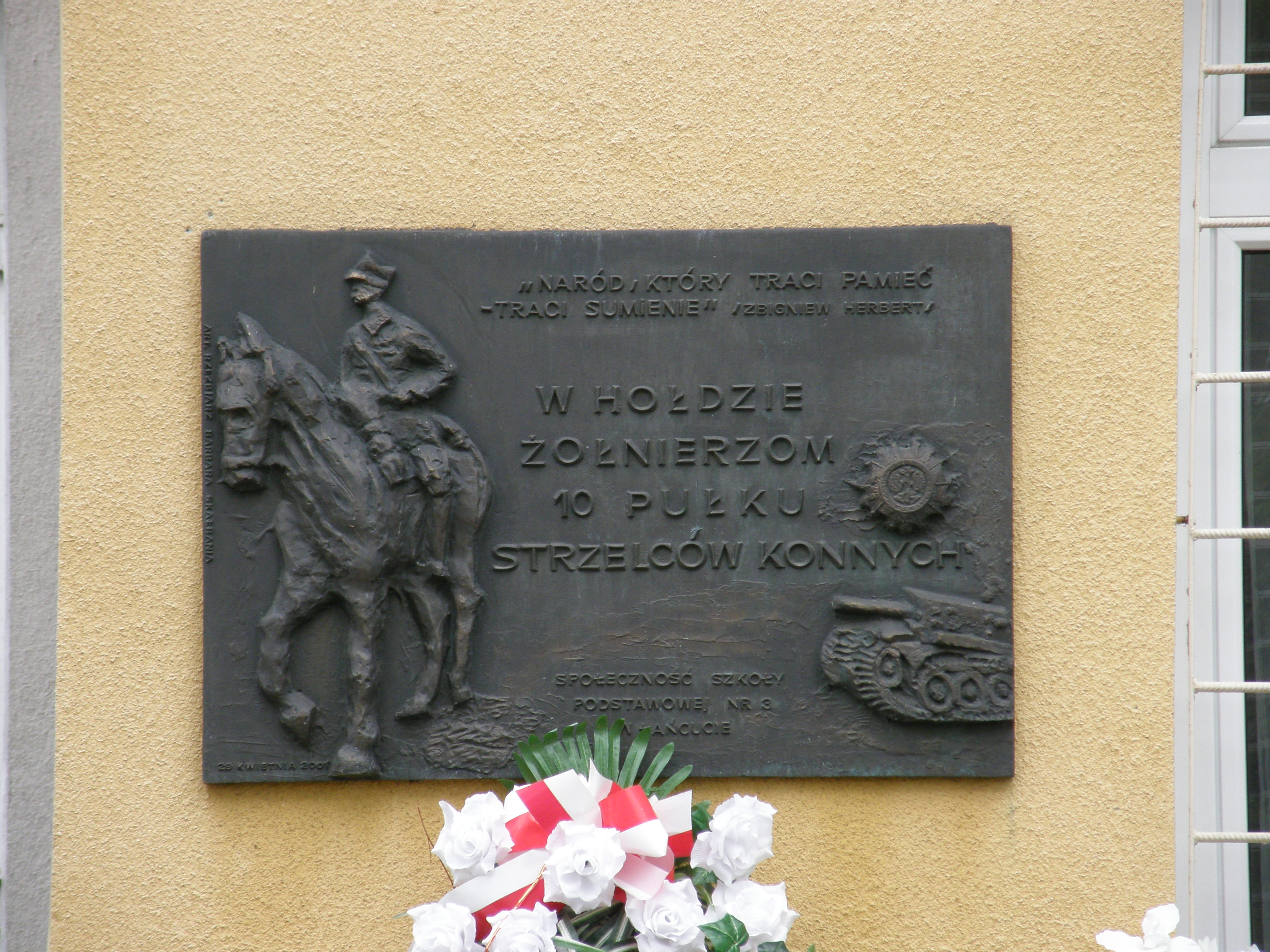 Szkoła podstawowa nr 3 im. 10 Pułku Strzelców Konnych - tablica pamiątkowa